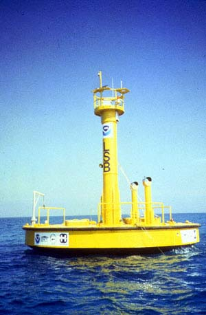 Life Support Buoy des Aquariuslabors